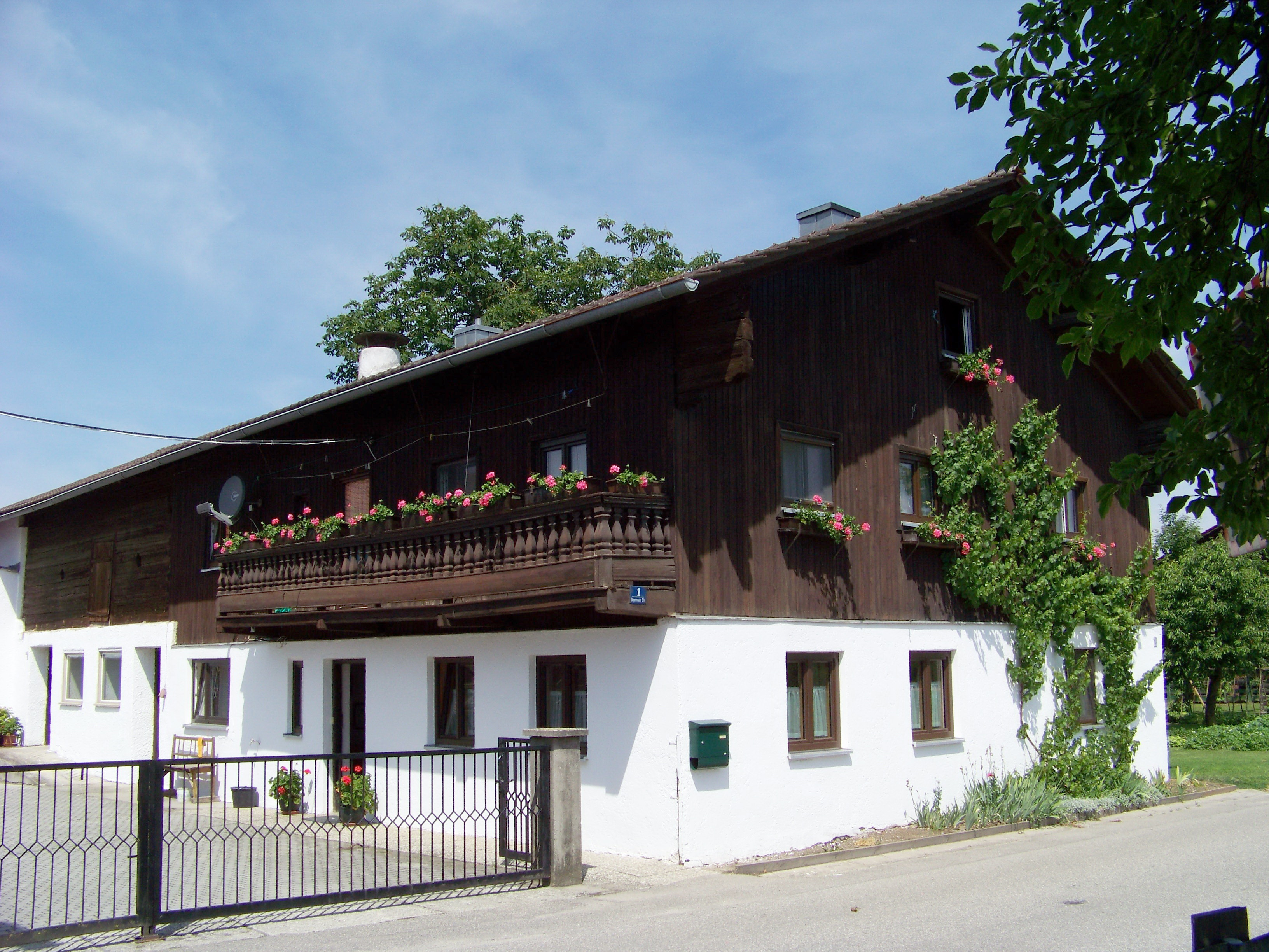 Wörth an der Isar, Degernauer Straße 1. Bauernhaus, Obergeschoß-Blockbau mit Flachsatteldach und Baluster Traufschrot, 19. Jahrhundert.